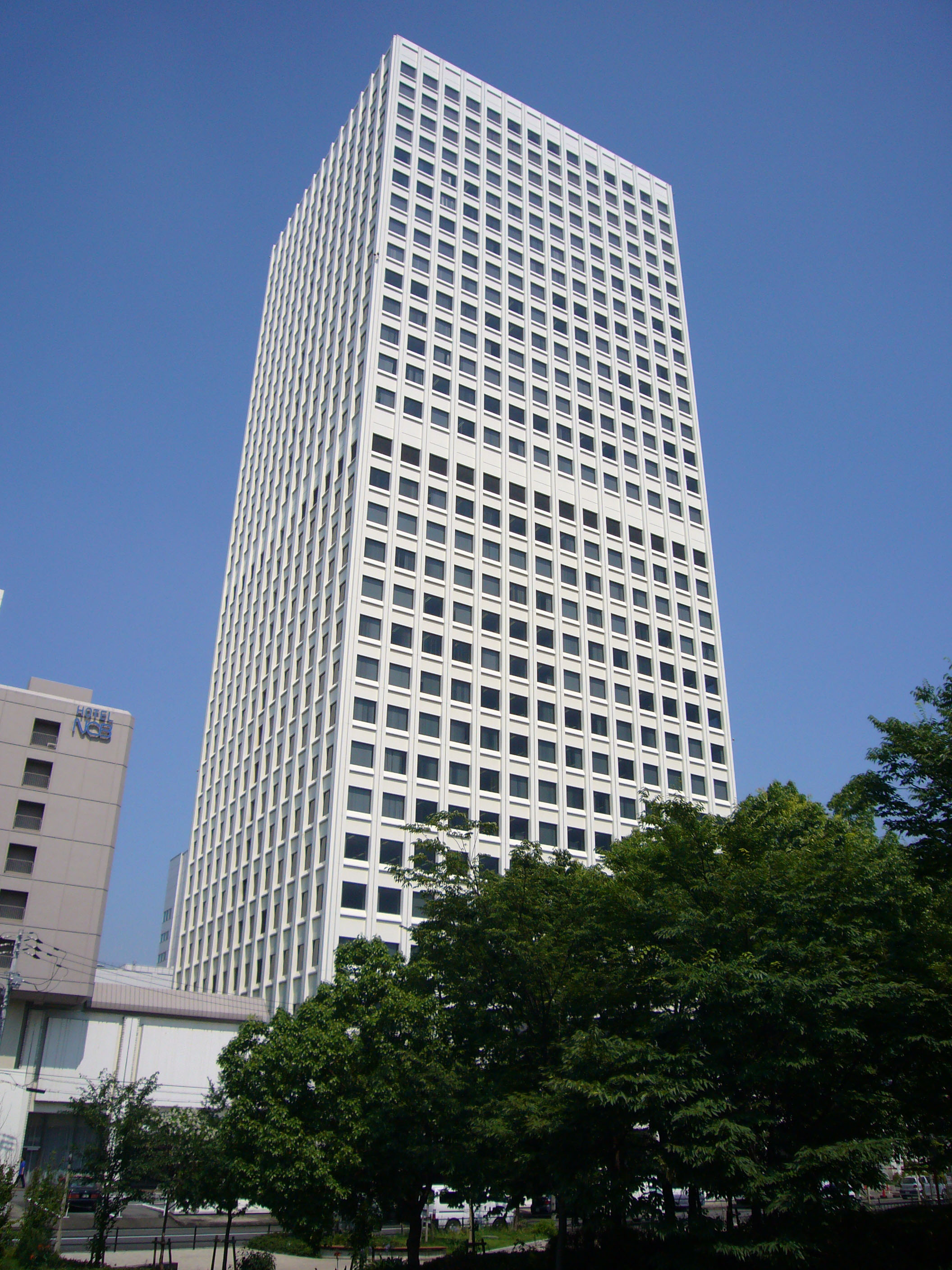 Nakanoshima Center Building in Osaka, Japan